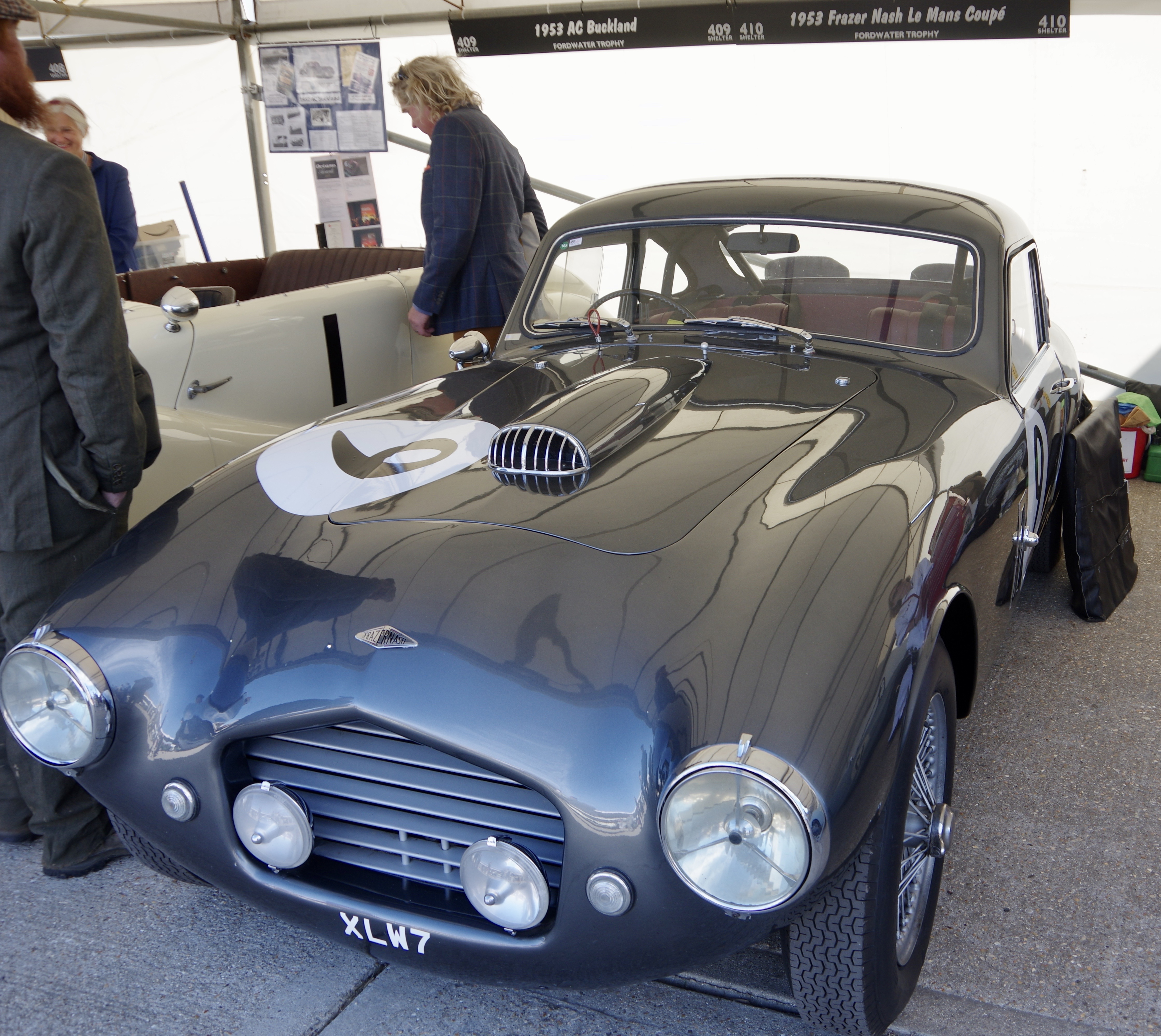 Goodwood Revival 2018